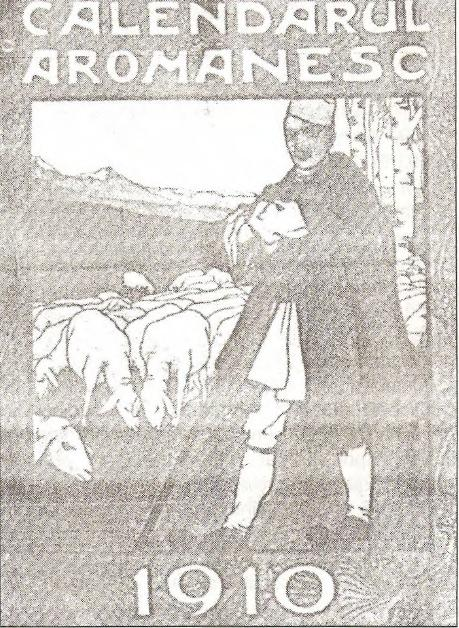 Арумънски календар